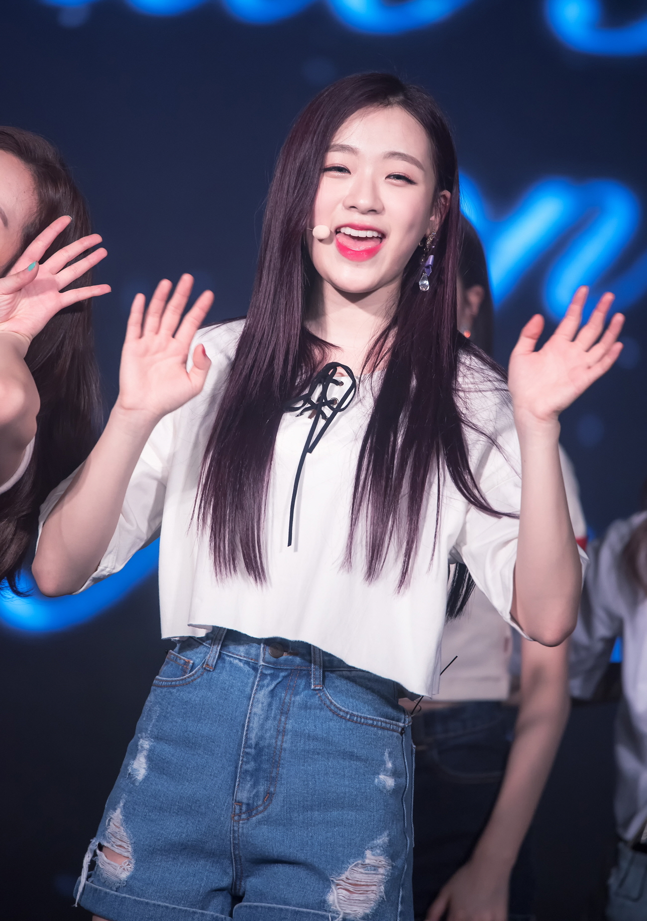 180414 에이프릴 미니콘서트